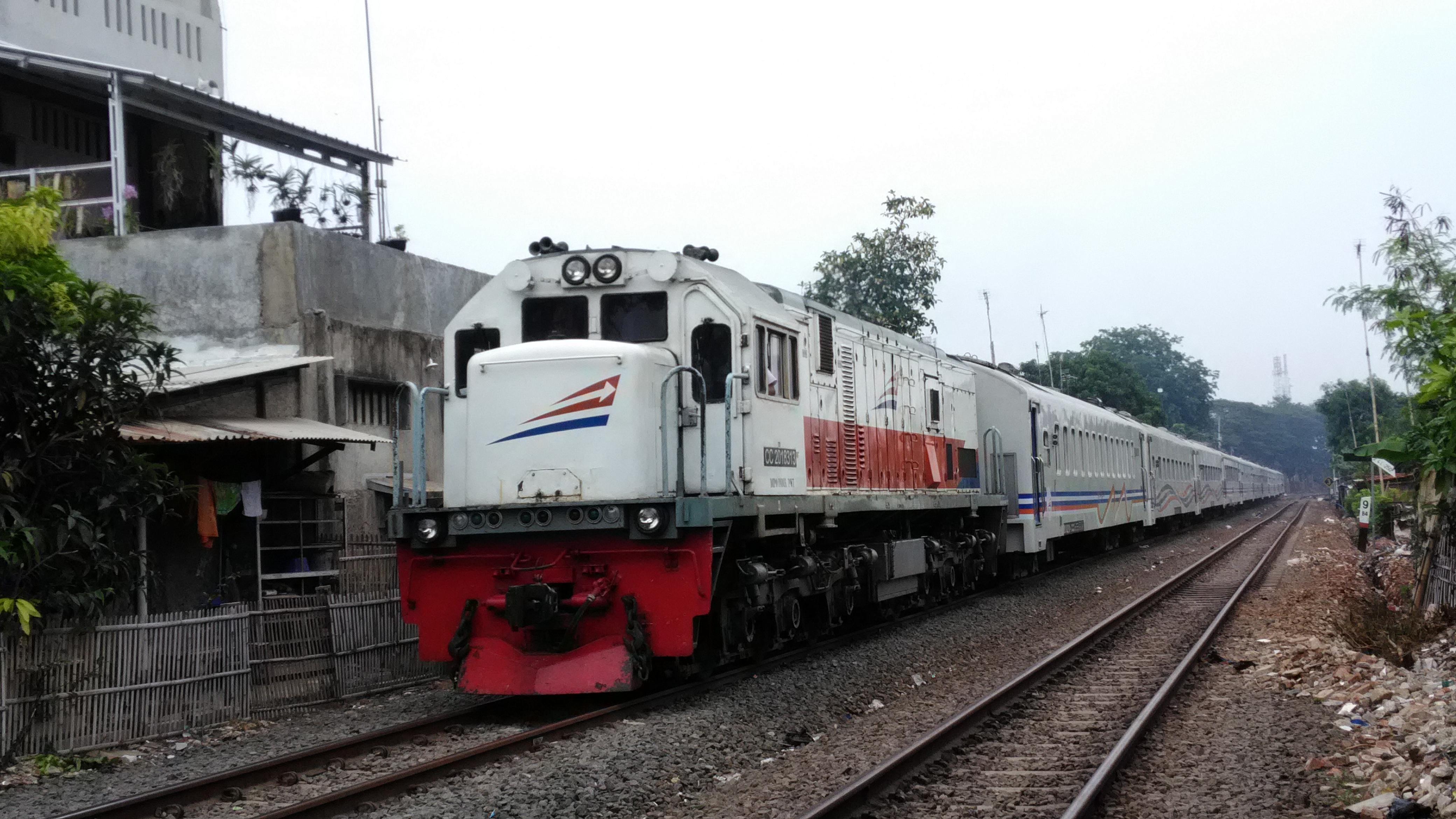 Sunda: KA Dharmawangsa ngaliwat di daérah Sukamulya, Pucung, Kotabaru